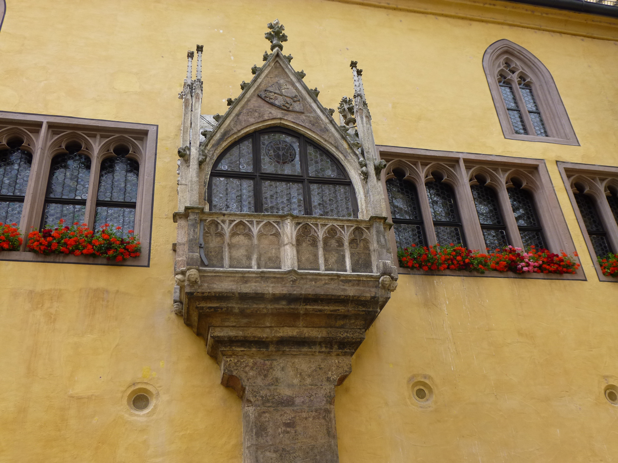 Der Erker des Reichssaals in Regensburg, Rathausplatz.This is a photograph of an architectural monument.